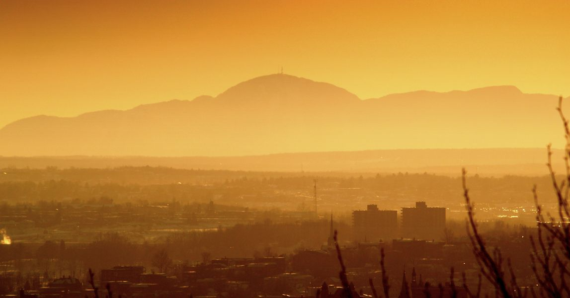 Panorama de Sherbrooke avec le mont Orford en arrière-plan au coucher de soleil